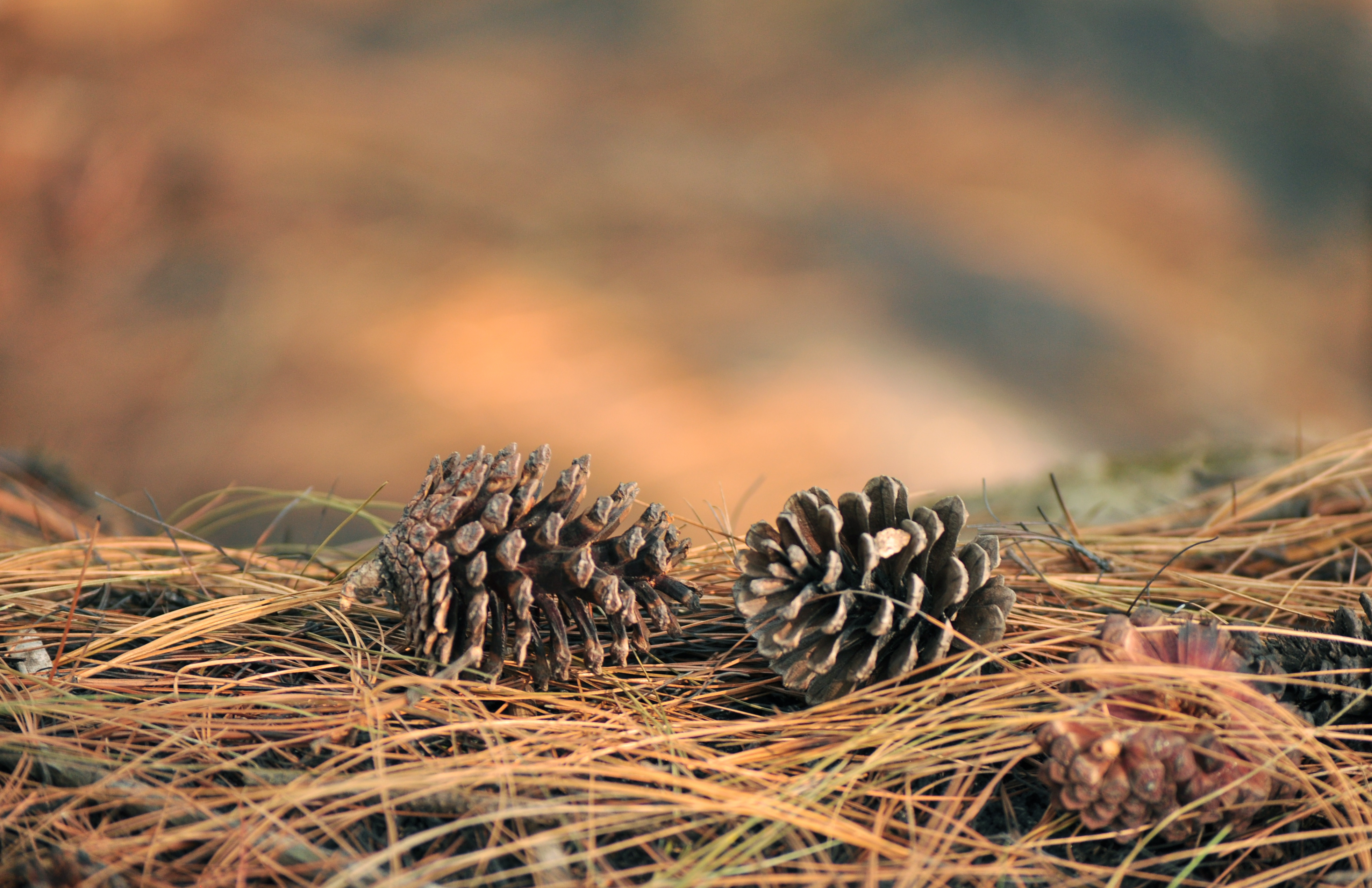 Pinus maximinoi cones, Guatemala